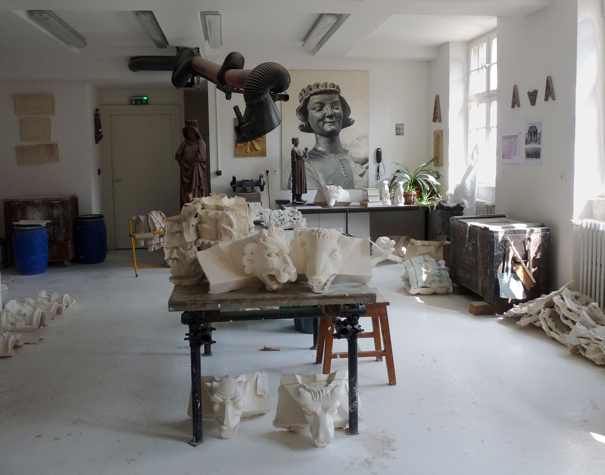 Atelier de moulages de la Fondation de l'Oeuvre Notre-Dame (cathédrale de Strasbourg)